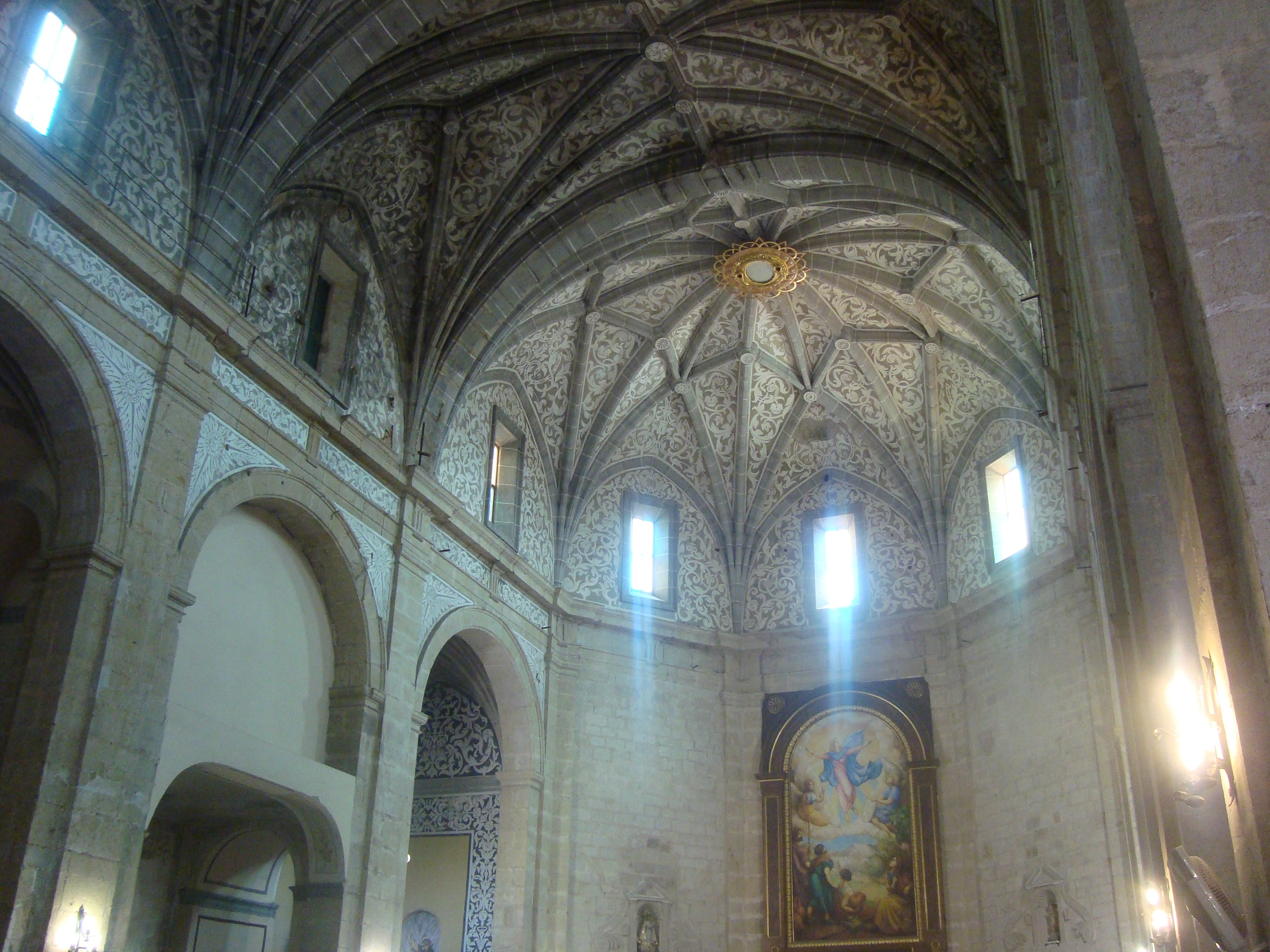 Església parroquial de l'Assumpció (Traiguera) 03.121-001.